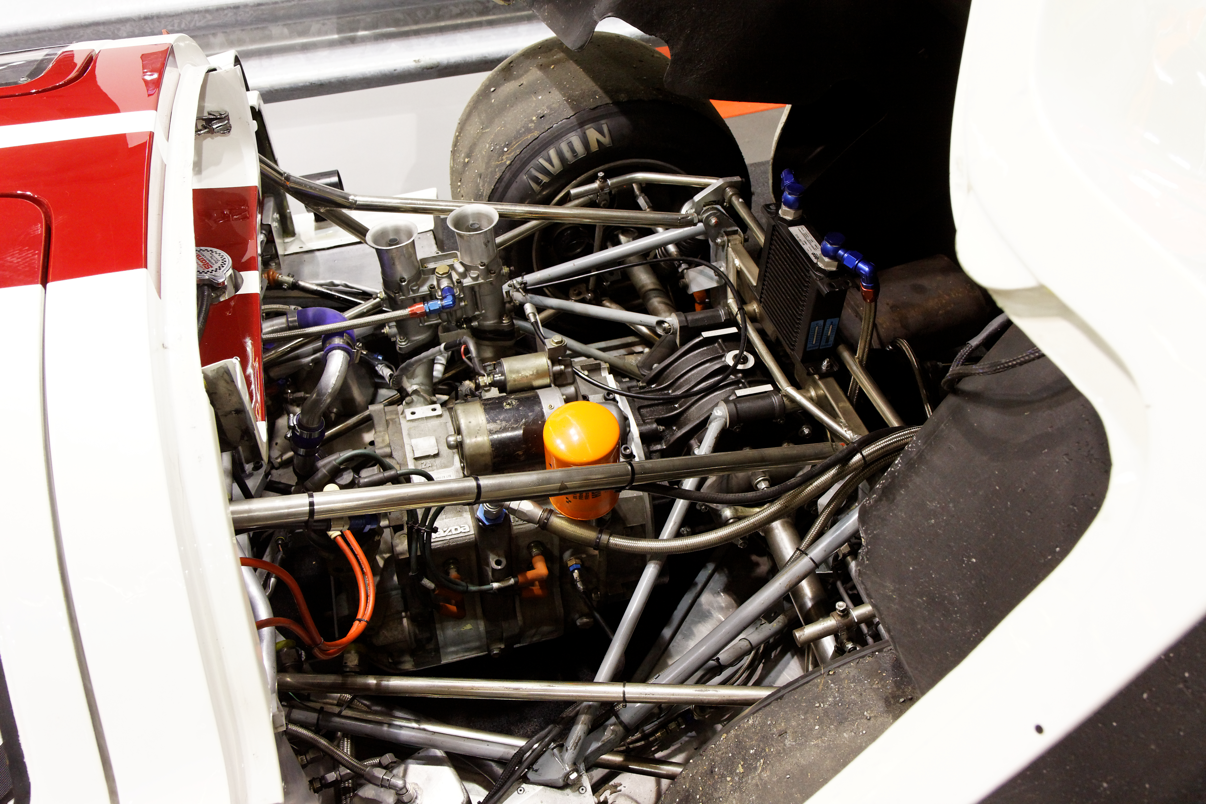 Photographie prise lors du salon rétromobile 2011 à Paris, porte de Versailles.